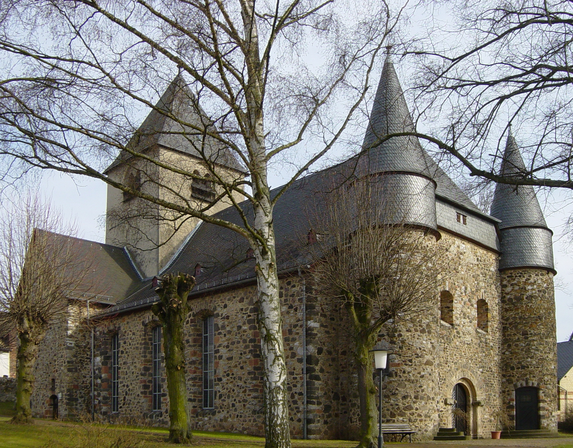 St.-Peters-Kirche in Großen-Linden, Ortsteil von Linden (Hessen)